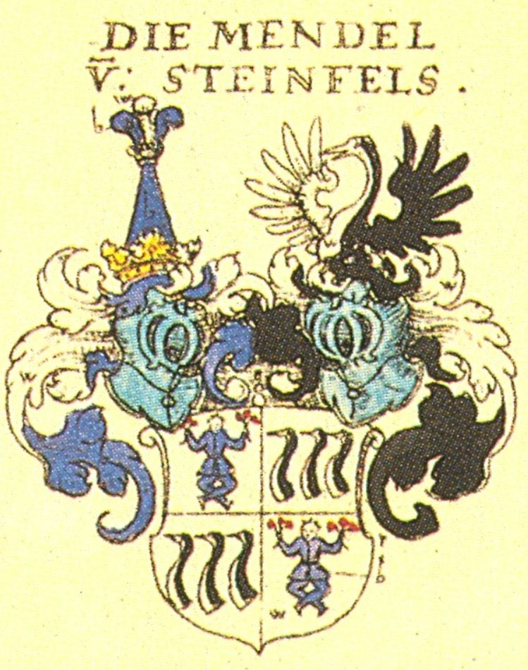 Wappen der Bayerischen Adelsfamilie Mendel von Steinfels